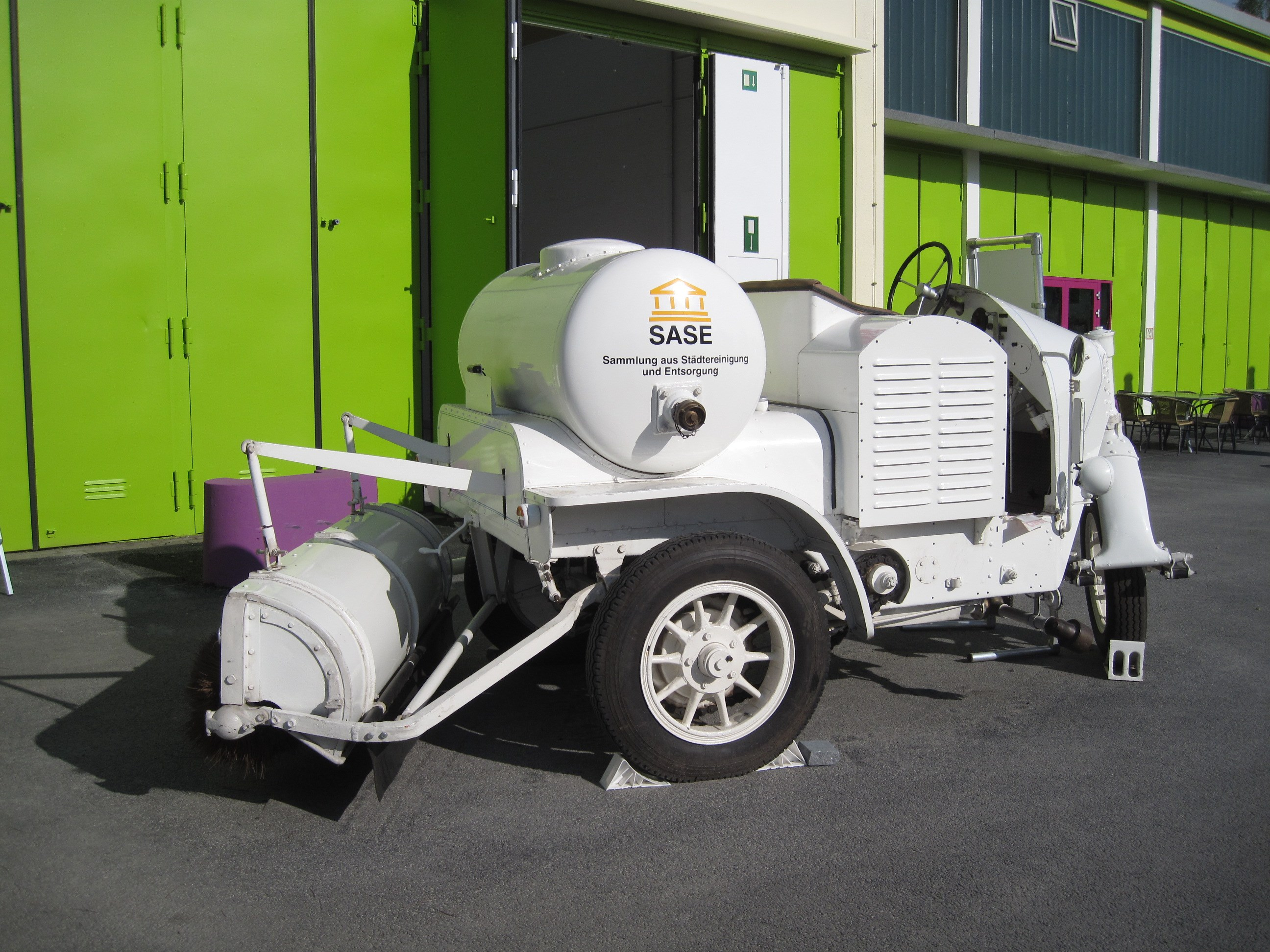 Dreirädrige Rinnstein-Kehrmaschine mit Rieselvorrichtung und 700-Liter-Wassertank. Baujahr 1934, Aufbau Krupp, Fahrgestell Krupp St 20 A, 24 PS, 2350 cm³, Höchstgeschwindigkeit 20 km/h. Die Kehrmaschine war nicht selbstaufnehmend und wurde von 1921 bis Ende der 1930er Jahre gebaut. Sie hatte eine Länge von 5,02 Meter, eine Breite von 2,35 Meter und eine Höhe von 2 bis 2,40 Meter, bei einem Leergewicht von 1.800 Kilogramm.